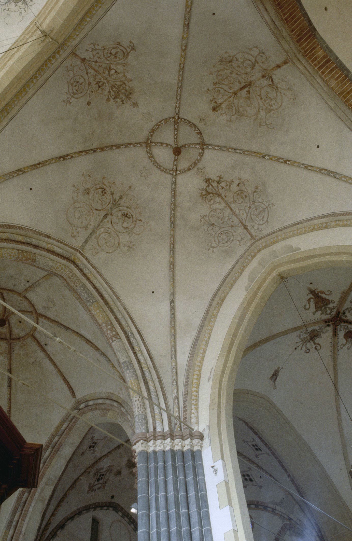 Martinikerk: INTERIEUR, GEWELF